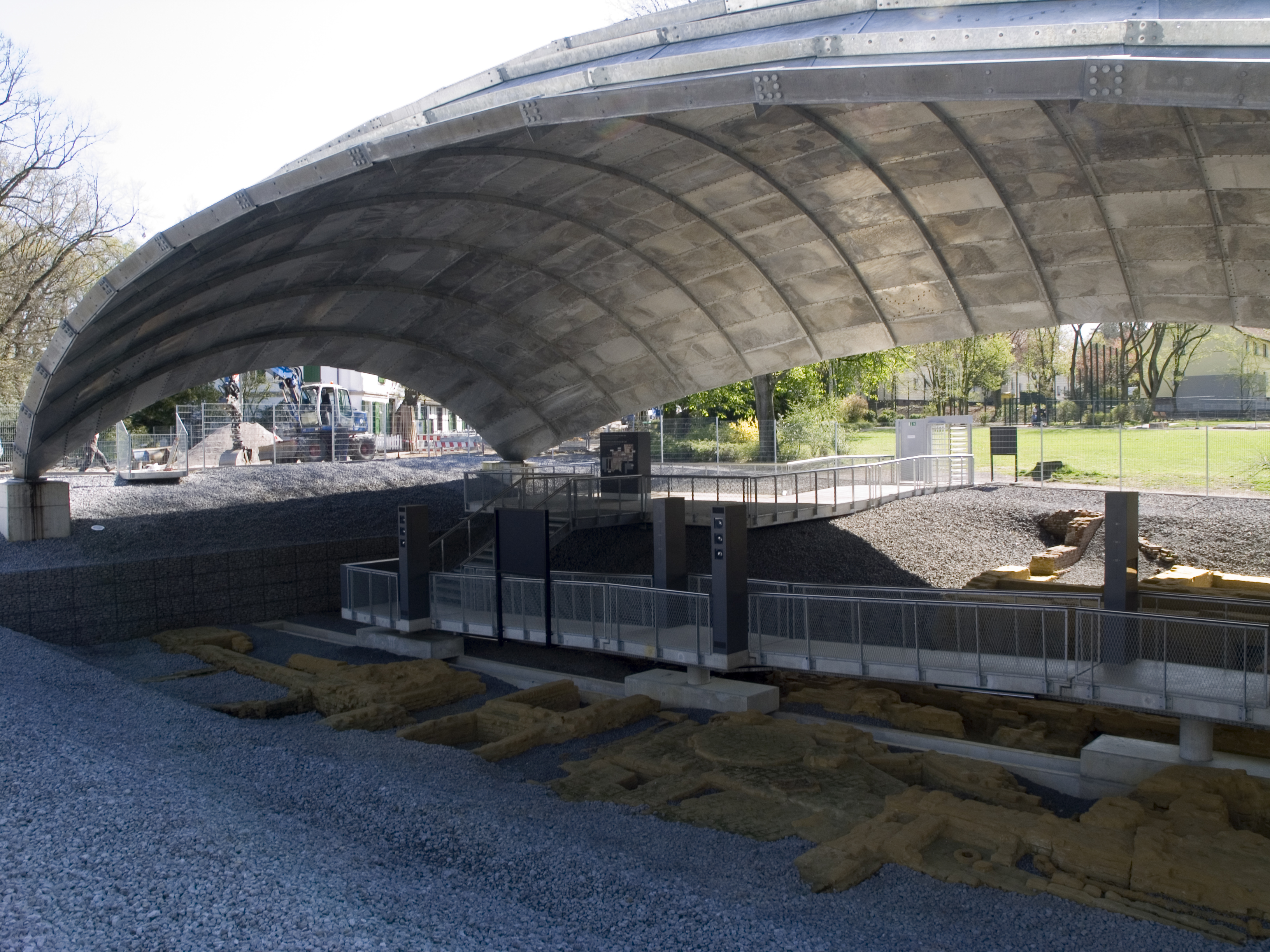 Северный Рейн - Вестфалия, Оберхаузен - Металлургический завод Святого Антония